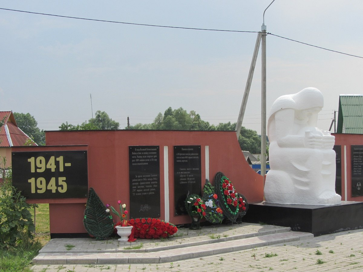 Ельск. Помнік ахвярам XX стагоддзя